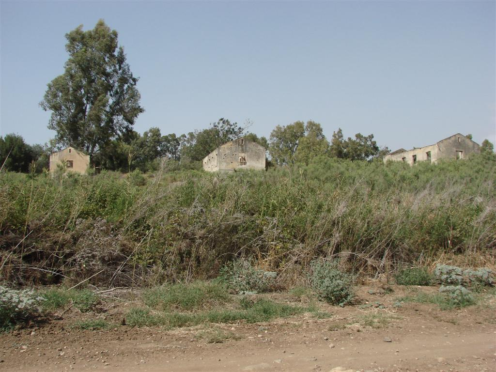 משק שוורץ על תל נעמה The site's ID in Wiki Loves Monuments photographic competition is 6-0357-001